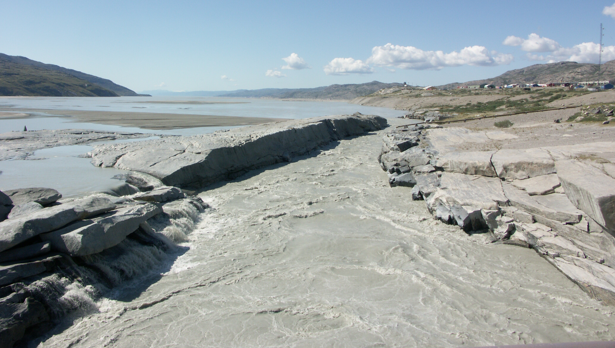 Estuary of Qinnguata Kuussua, Kangerlussuaq, Greenland